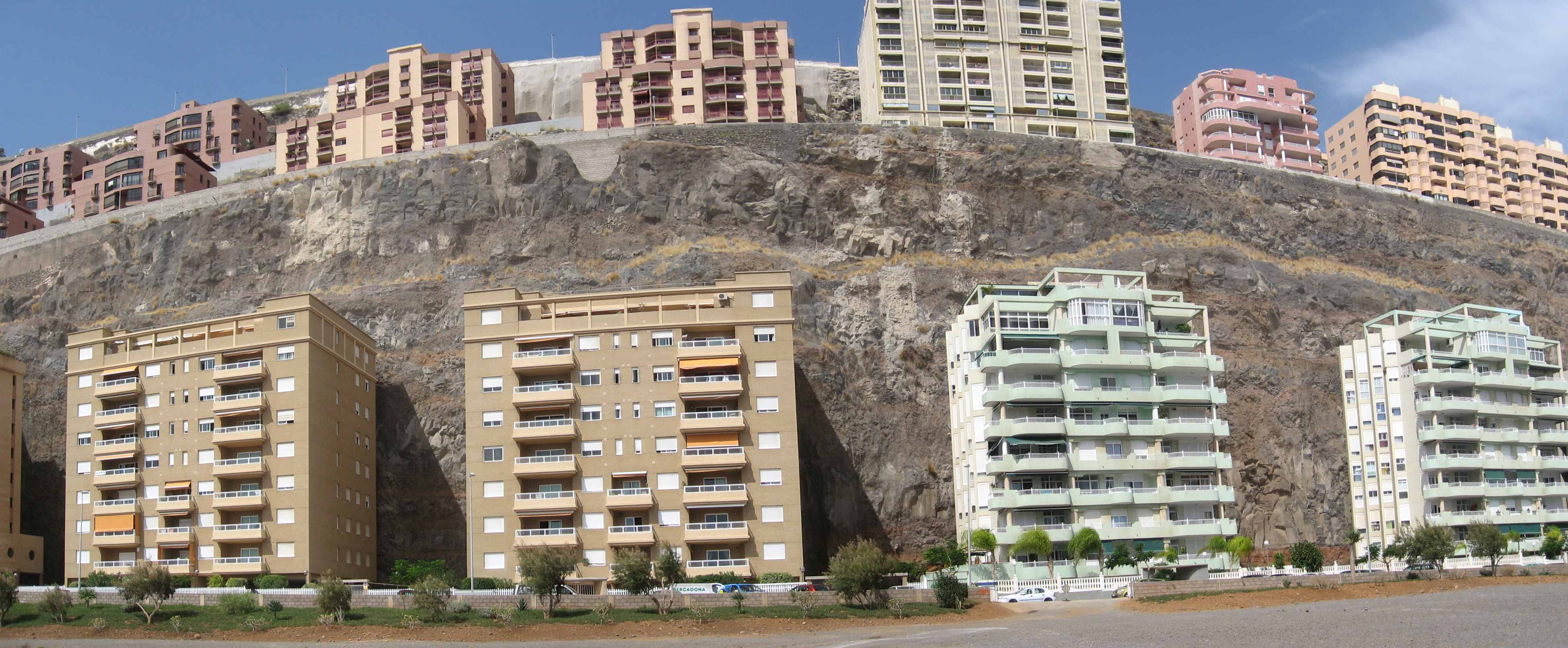 Vista de Radazul Bajo (El Rosario)